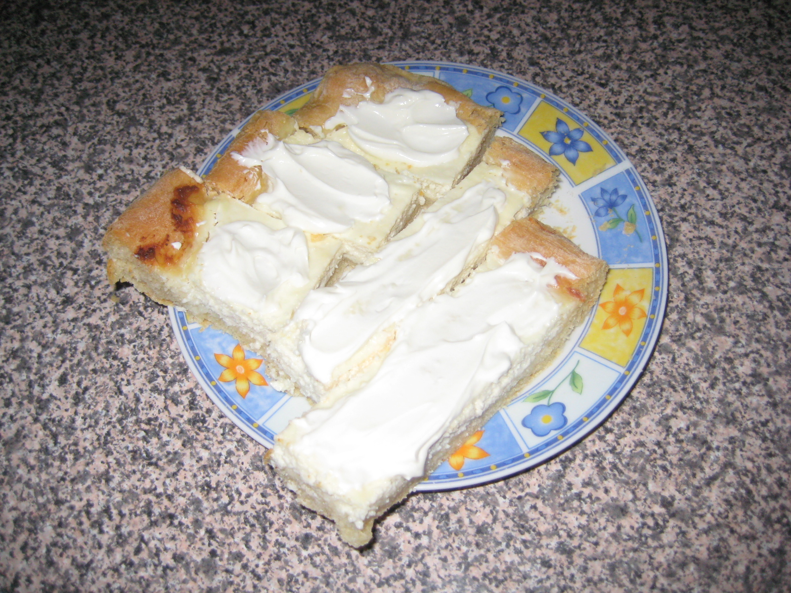 Posolanka, slovenian national dessert (Prekmurje)